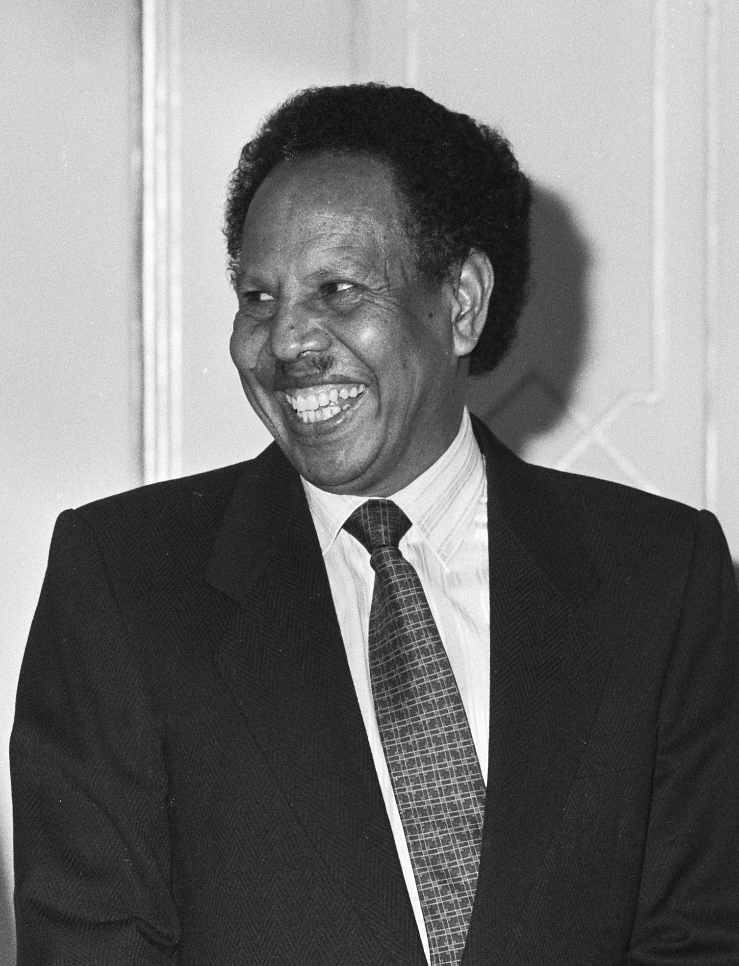 De Soedanese minister president dr. El Gizouli Daffalla op Huis ten Bosch